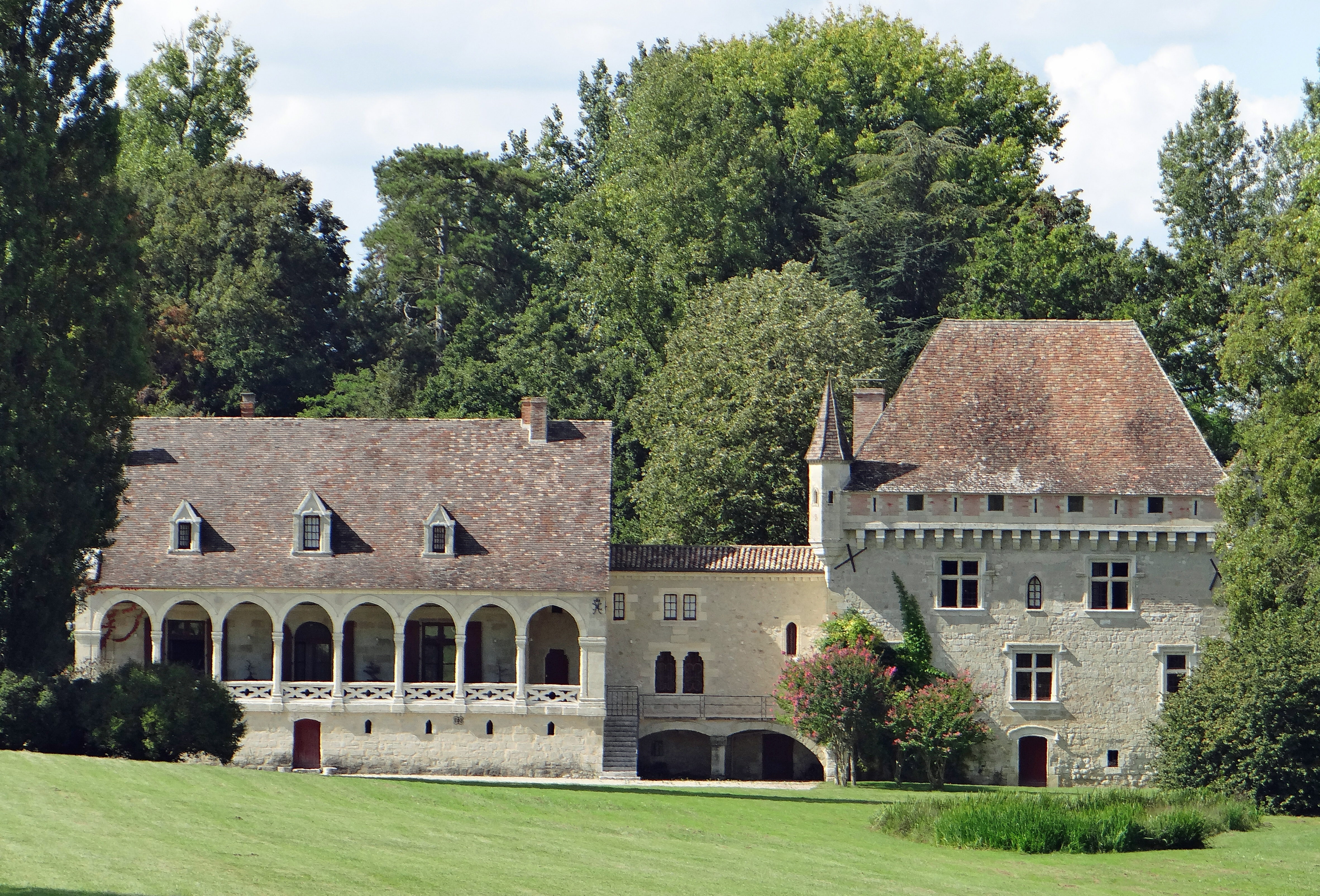 Roumagne - Château de Frémauret